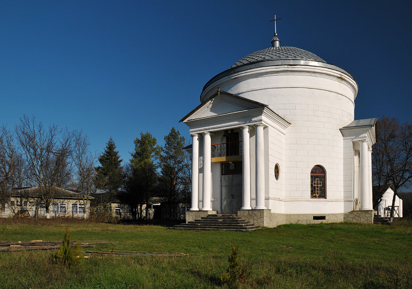 Мурована церква св. Олександри в с.Лебедівка (1843 р.)